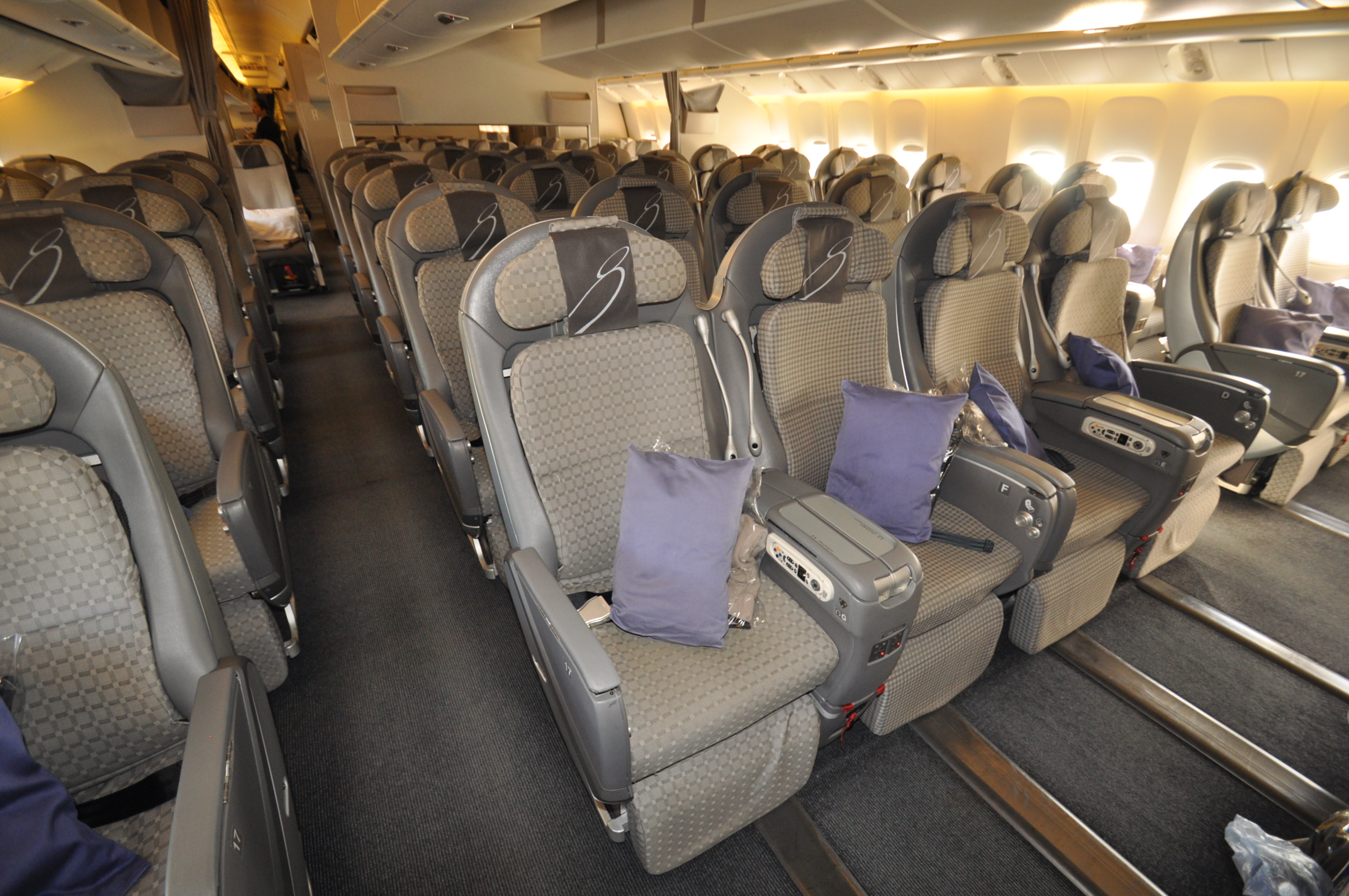 ＪＡＬ プレミアムエコノミークラス 「スカイシェルシート」